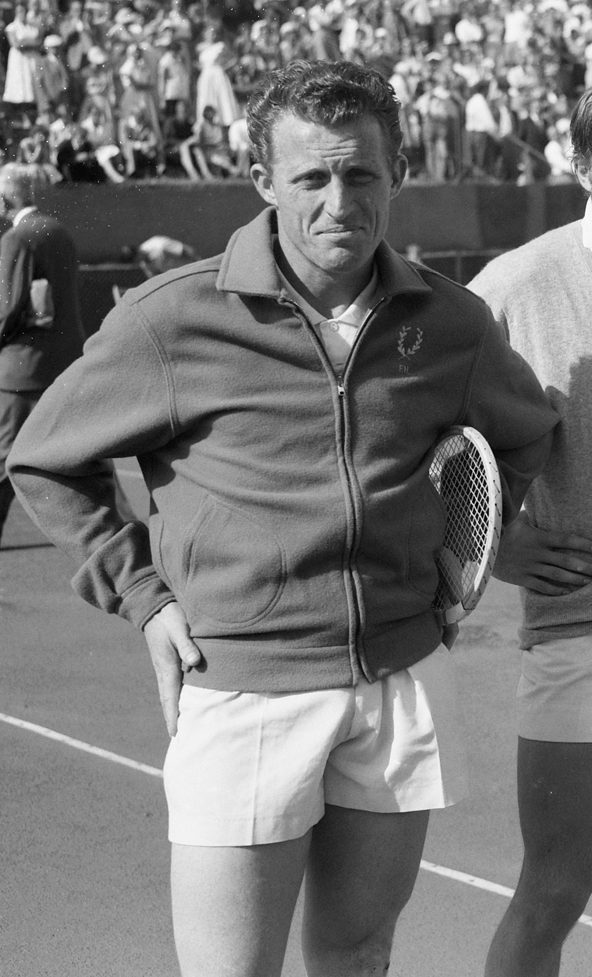 Tennis. Wimbledonsterren in Noordwijk. Alfred Huber